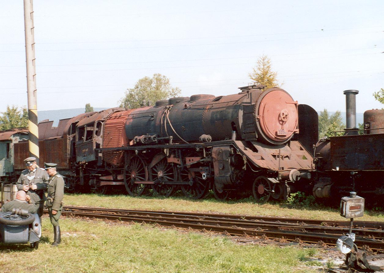 399.005 im Eisenbahnmuseum Bratislava Vychod